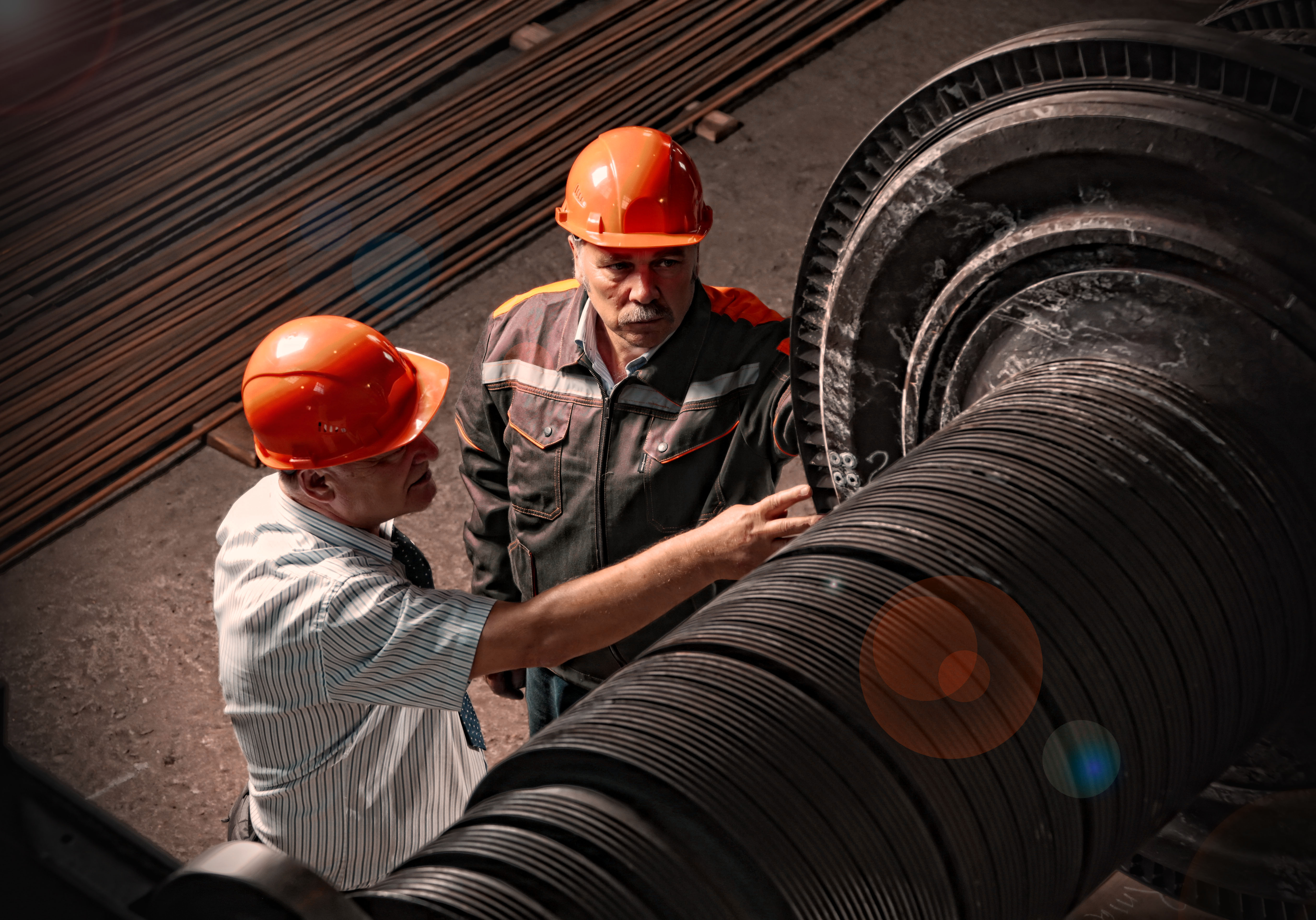 фотограф Андрей Шангин